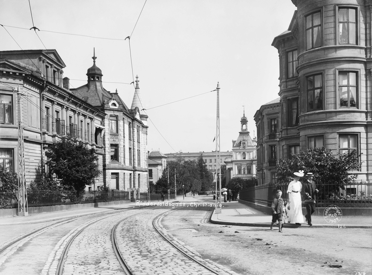 Riddervolds gate i retning slottet, sett fra krysset med Oscars gate. Mittet-postkort fra rundt 1907. Fra Byhistorisk samling hos Oslo Museum.